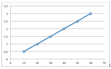 Immunodifusió: Relació lineal entre el radi de la circumefèrencia i la [Ag] en U/ml